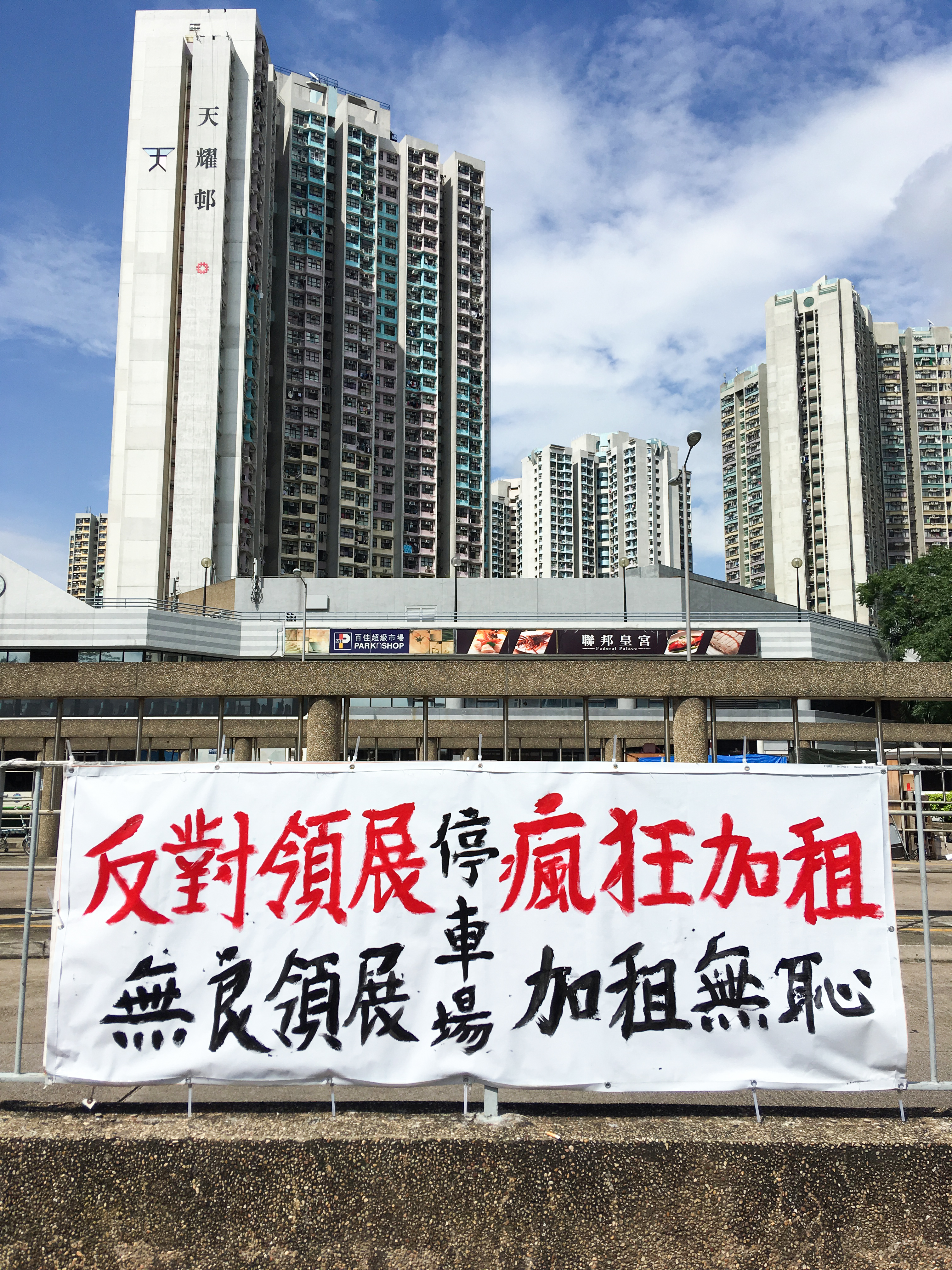 Banner against The_Link in Tin Yiu Estate